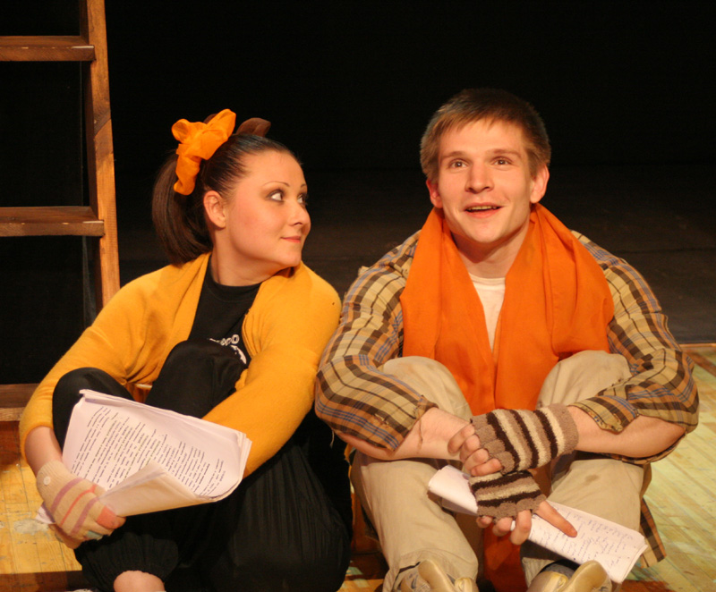 Актёры Ольга Лисенко и Алексей Кривега. Сцена из спектакля «Зимы не будет» режиссёра Екатерины Гороховской